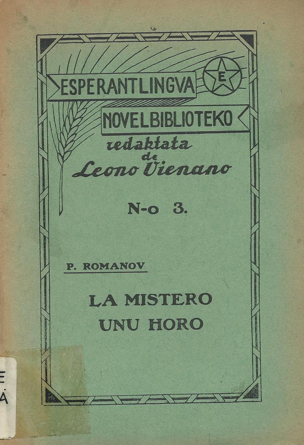 librokovrilo de "La Mistero. Unu Horo", 1930